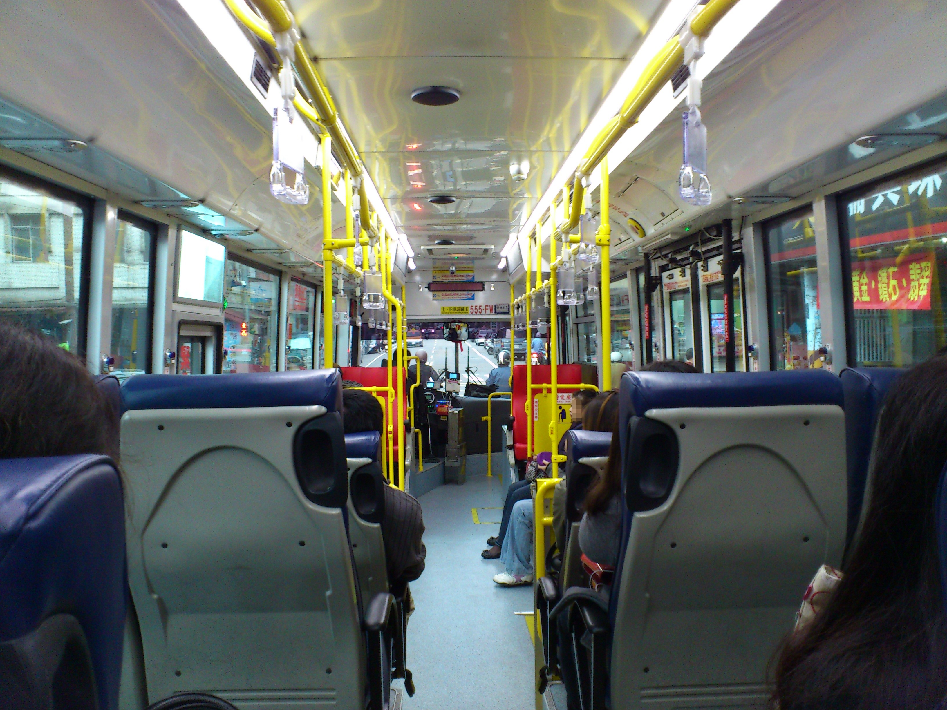 基隆客運金龍汽車KL6120U2大客車555-FW內裝。